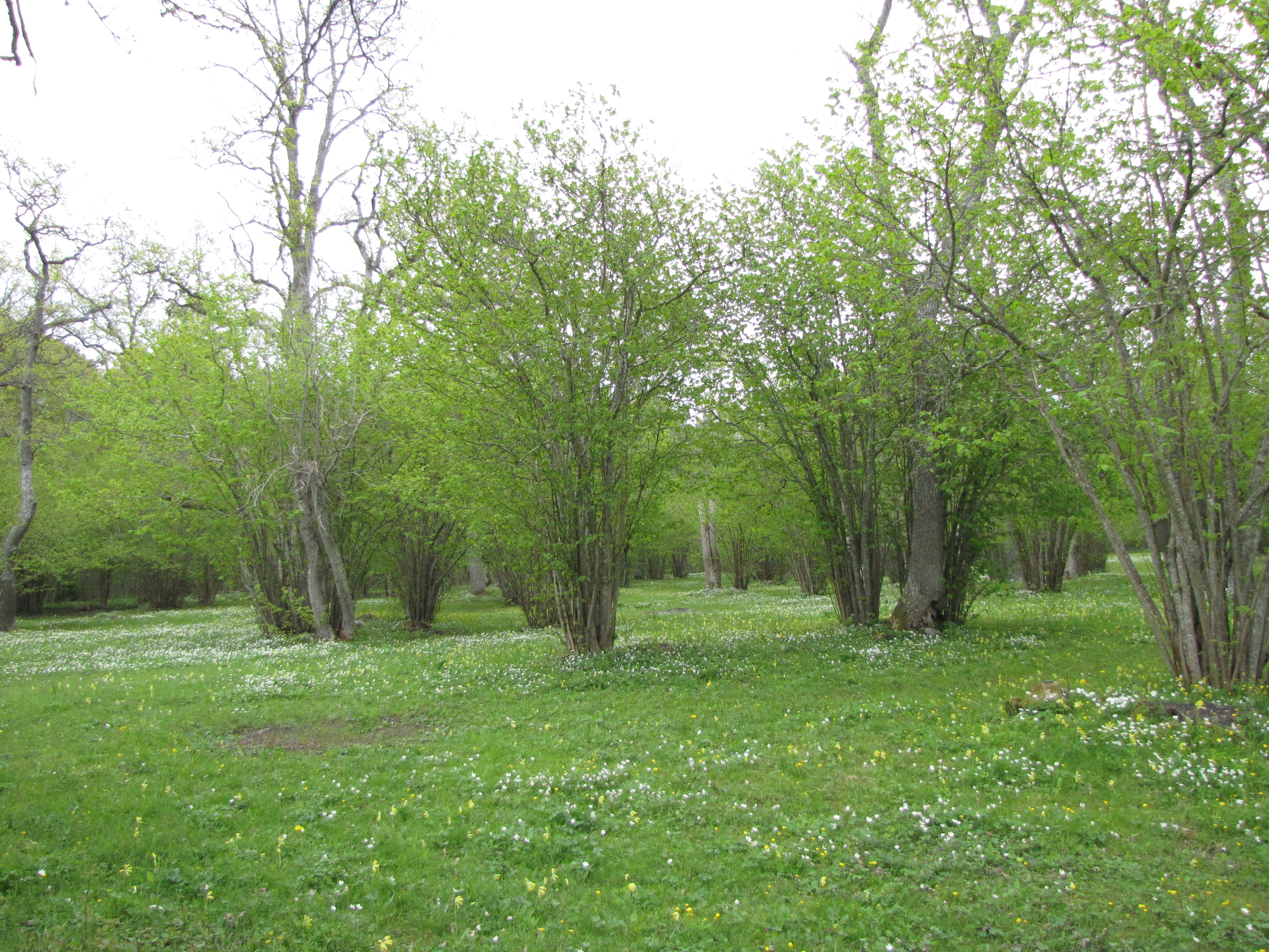 Hammarsänget är en del av naturreservatet Dagghagen.